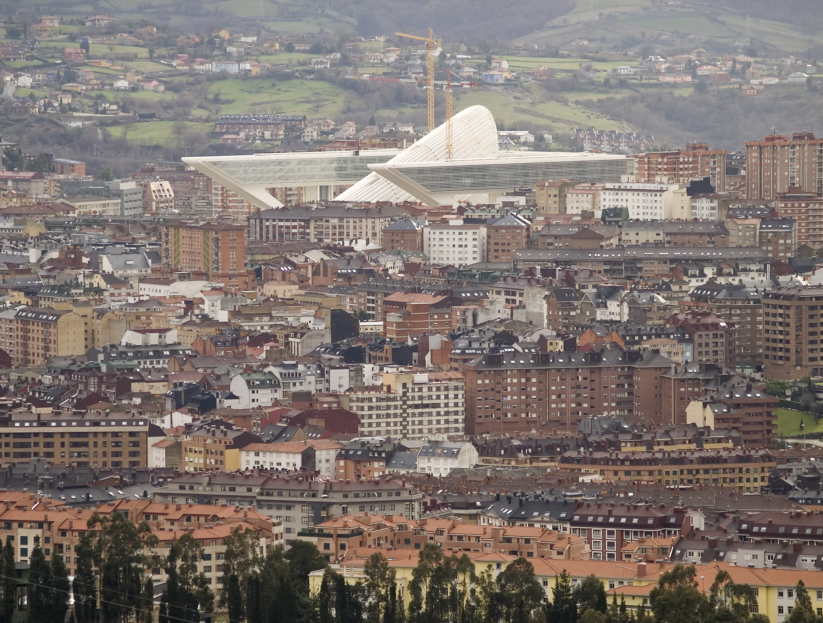 El Palacio de Congresos Princesa Letizia de la ciudad de Oviedo (Asturias, España) visto desde el Monte Naranco. Está diseñado por el arquitecto valenciano Santiago Calatrava